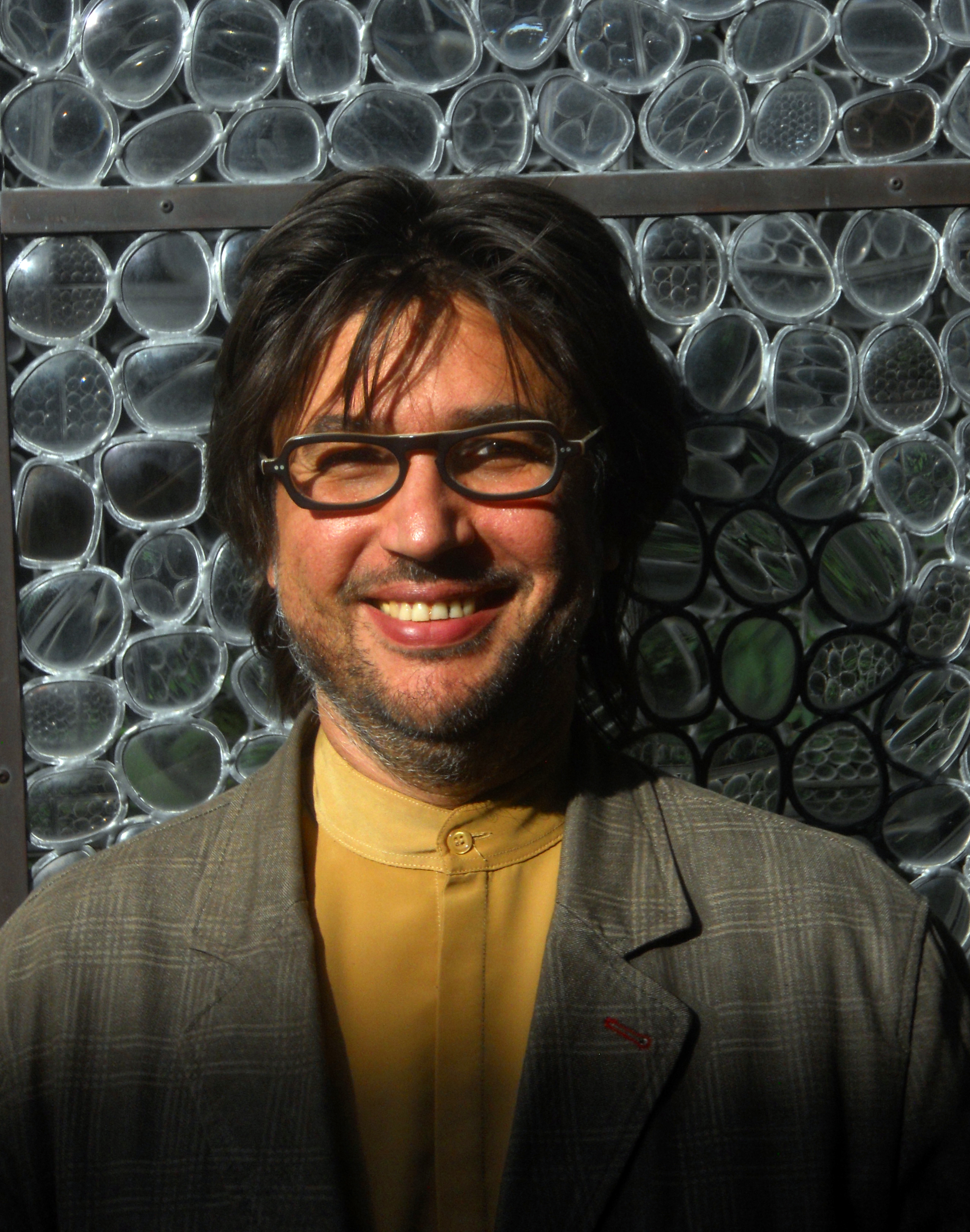 Alexandre Vanautgaerden, devant un détail de l'œuvre Cambra (2000) de Perejaume, dans le Jardin philosophique du Musée de la Maison d'Erasme